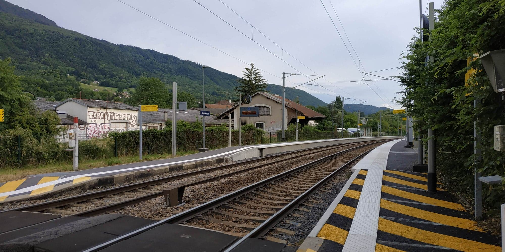 Gare SCNF de Machilly.